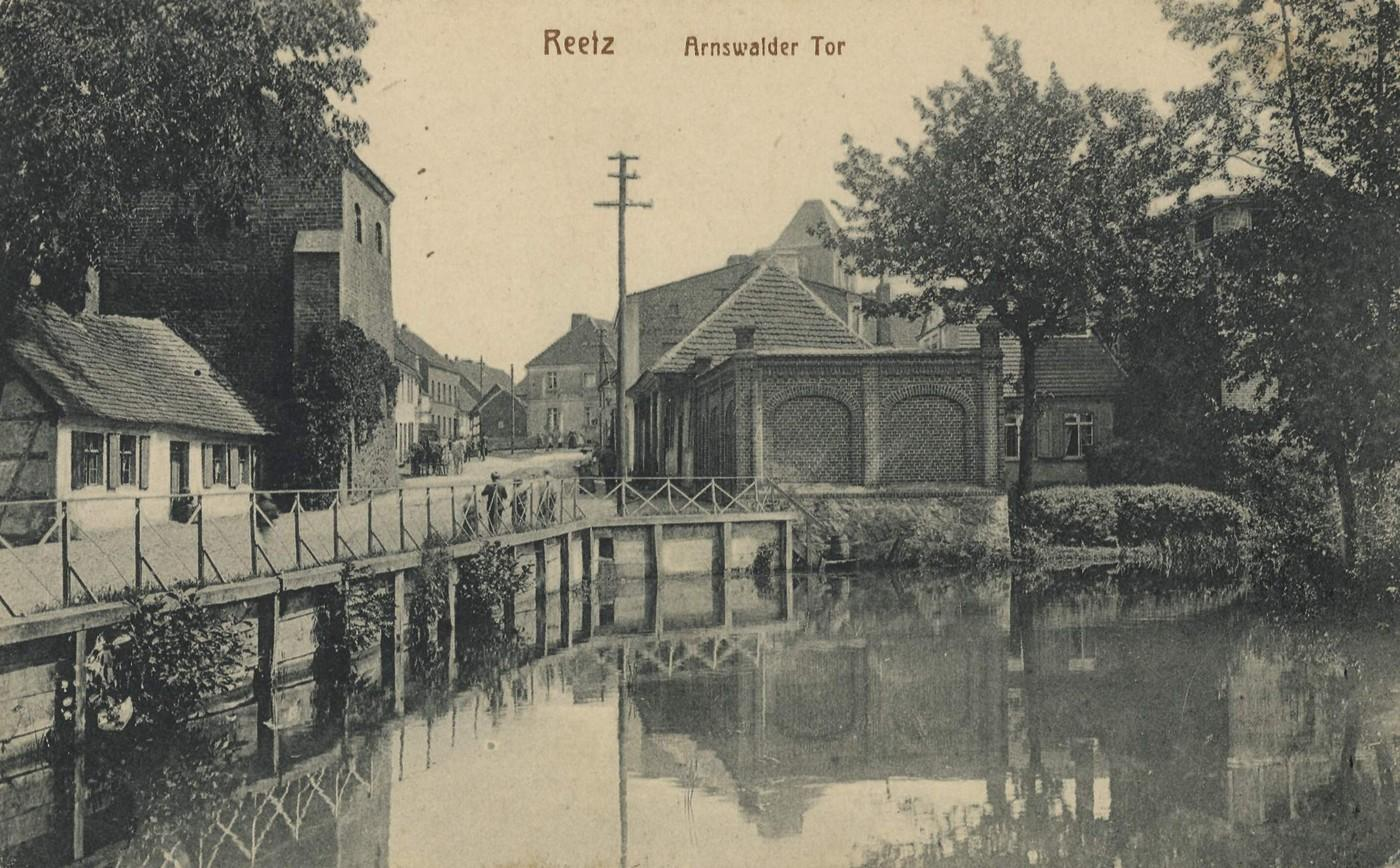 Brama Choszczańska w Reczu.